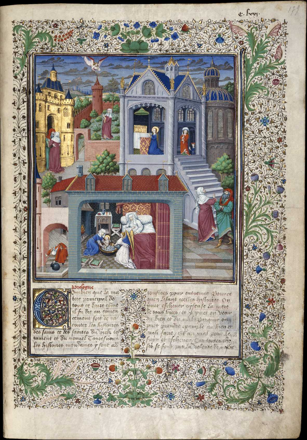 Conception, Nativité et Éducation de la Vierge. Jean Mansel, La Fleur des histoires (357 f., 42 miniatures pour Philippe le Bon)